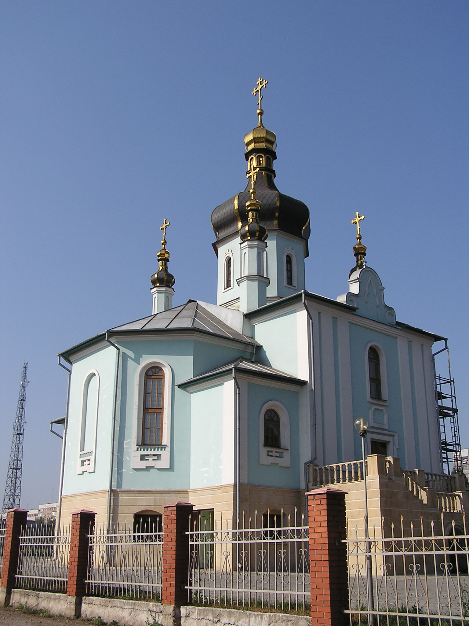 Донецк. Храм святого великомученика Георгия Победоносца.